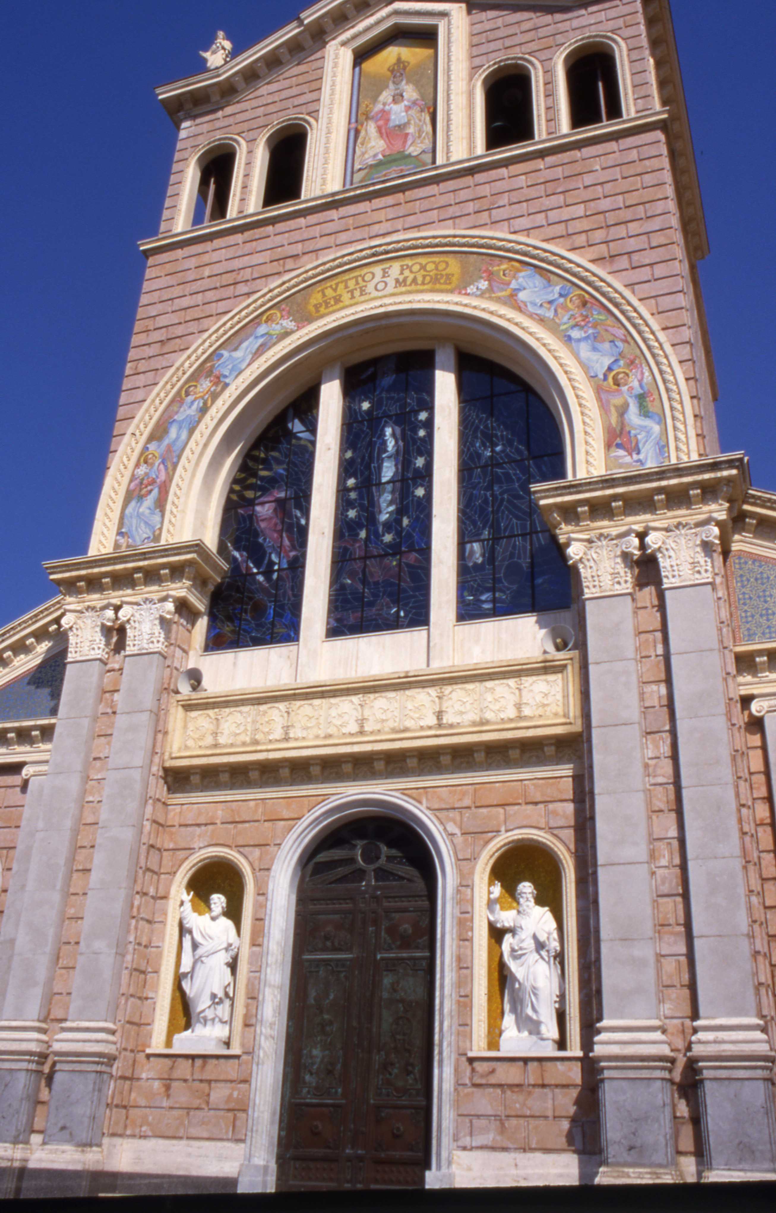 Tindari